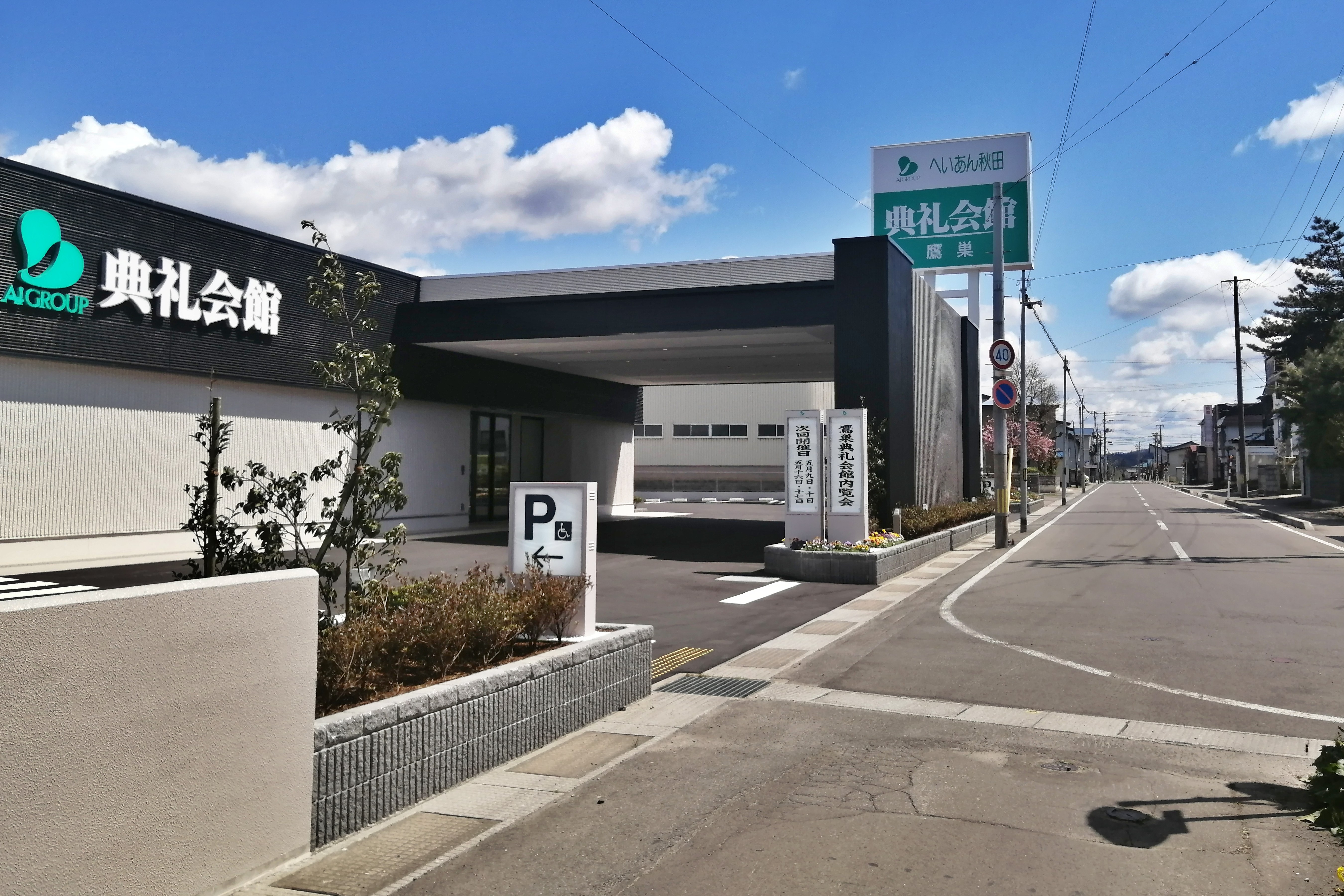 鷹巣典礼会館（秋田県北秋田市）